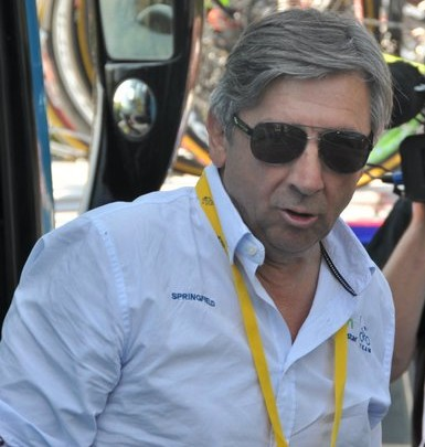 Eusebio Unze